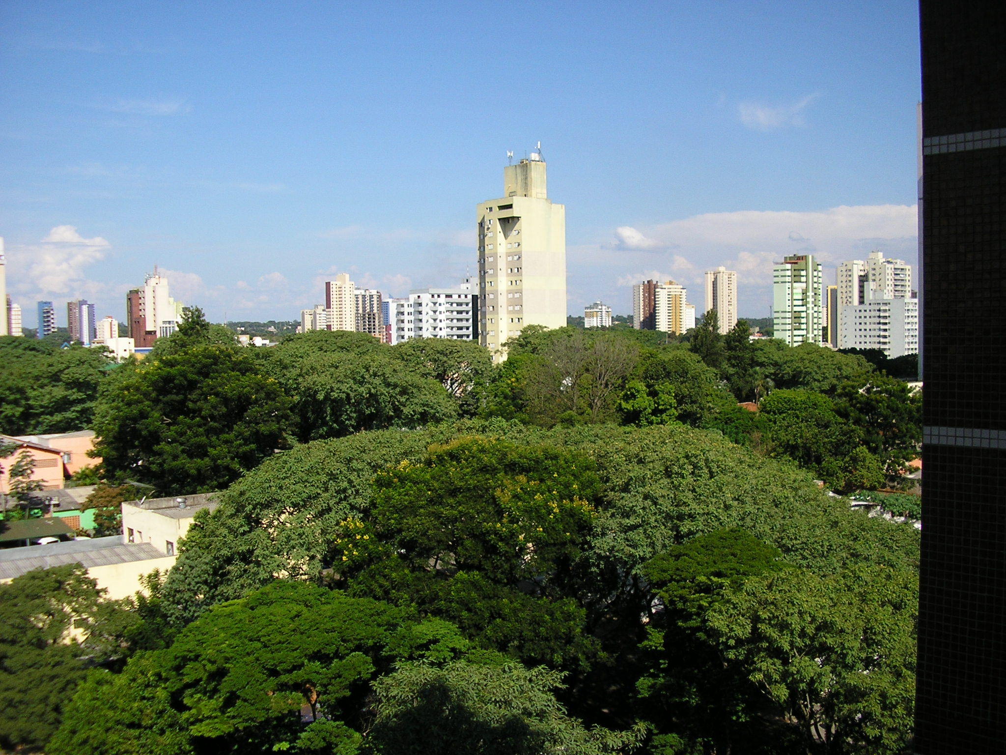 Foz do Iguaçú - grande cidade de Foz do Iguaçú (clique na foto)